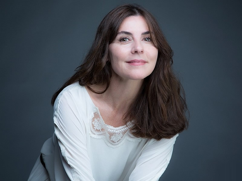 Foto Ana Fernández